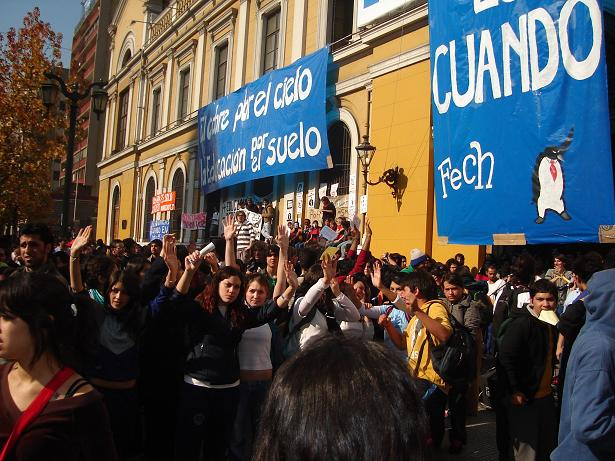 Toma de la Universidad de Chile como parte de las protestas escolares chilenas de 2006